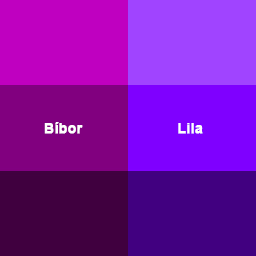 Bíbor és lila színminta világos és sötét példákkal.